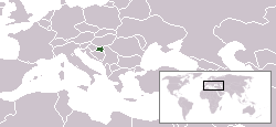 Redigerad version av Kroatiens karta. Gjord av Sundström.